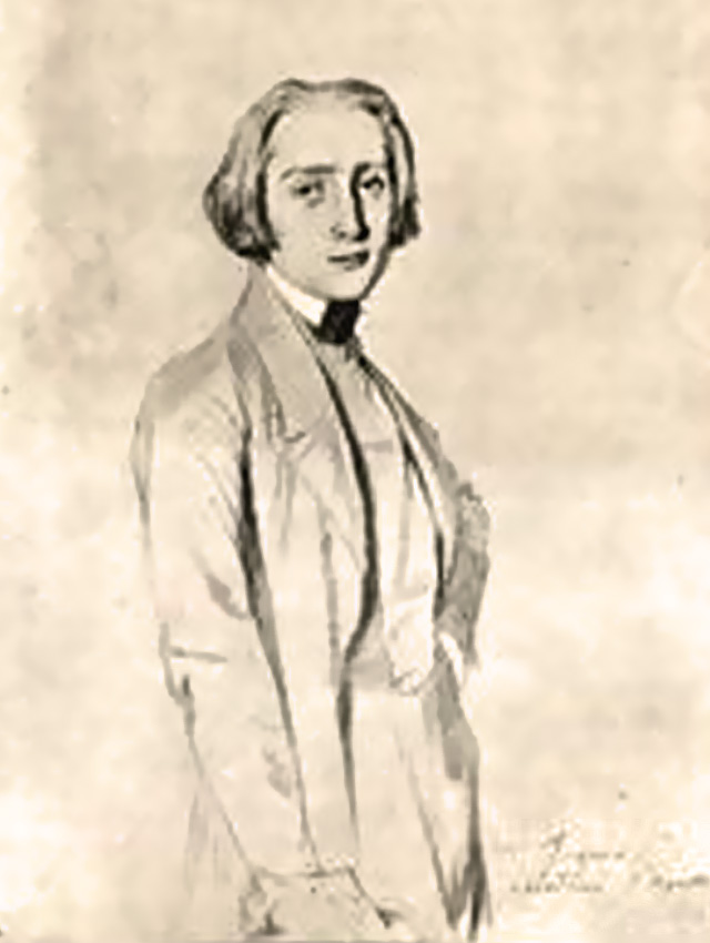 Le jeune Franz Liszt vers 1832